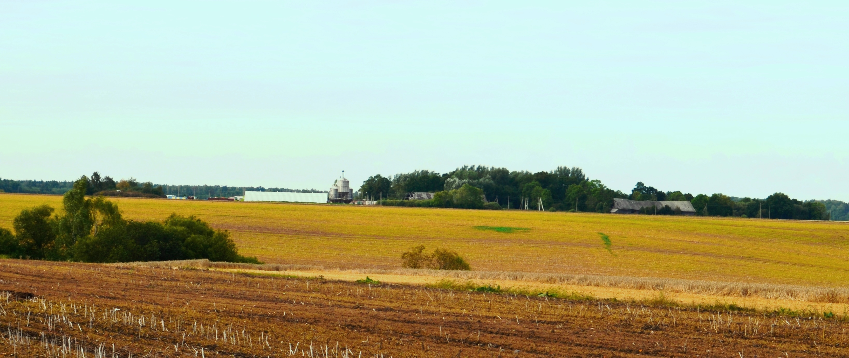 Paskerdūmys, Kėdainių r.